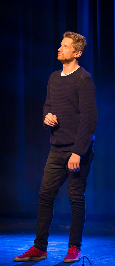 Odd-Magnus Williamson på "Crap åppå Park"-festivalen på Parkteateret